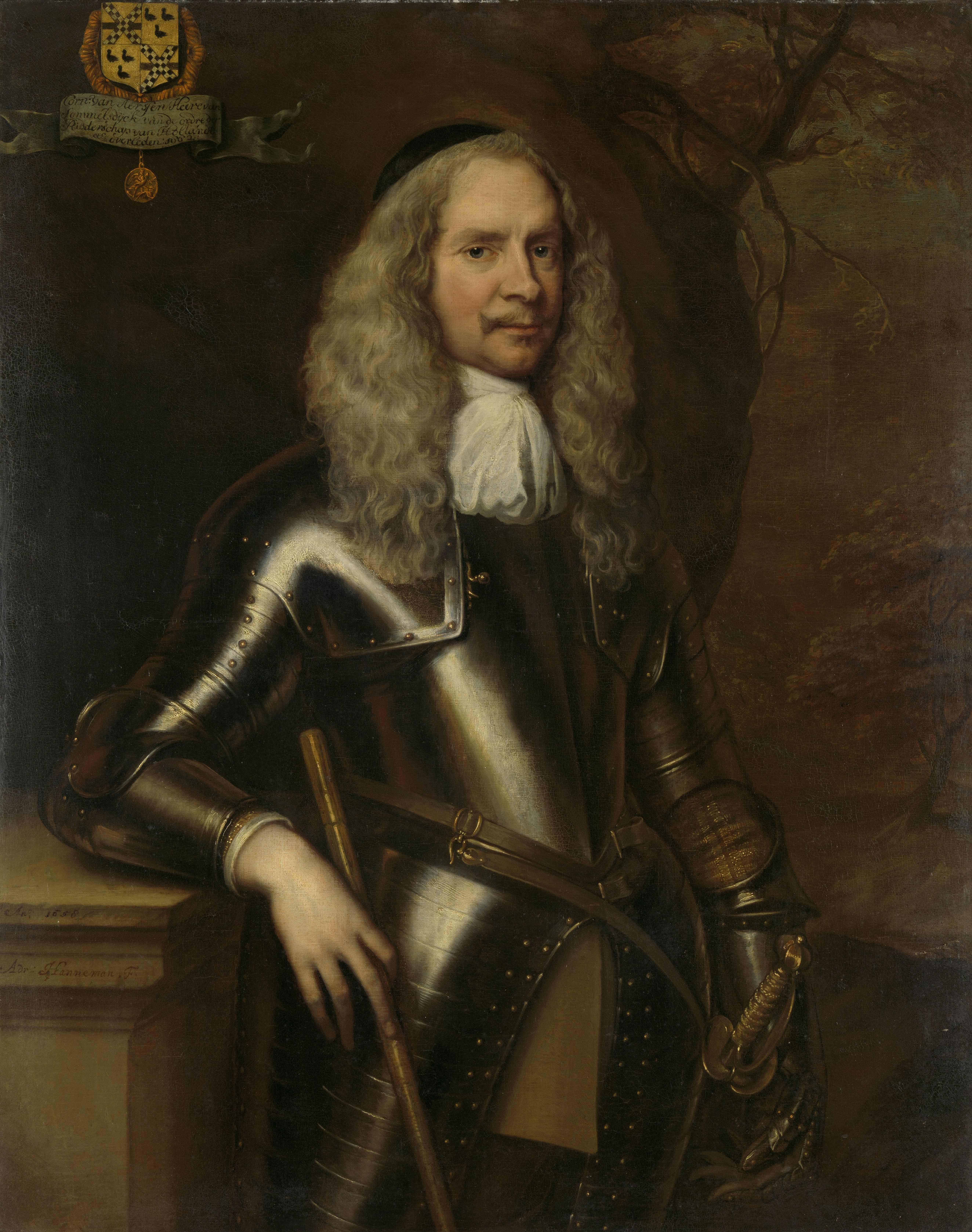 Portret van Cornelis van Aerssen, heer van Sommelsdijk, kolonel bij de cavalerie. Heupstuk, staande in wapenrusting met de commadostaf in de rechterhand. Rechts een landschap. Linksboven het familiewapen Van Aerssen / Wernhout, omgeven door de keten met de penning van de Orde van St. Michiel, daaronder een banderol met opschrift.